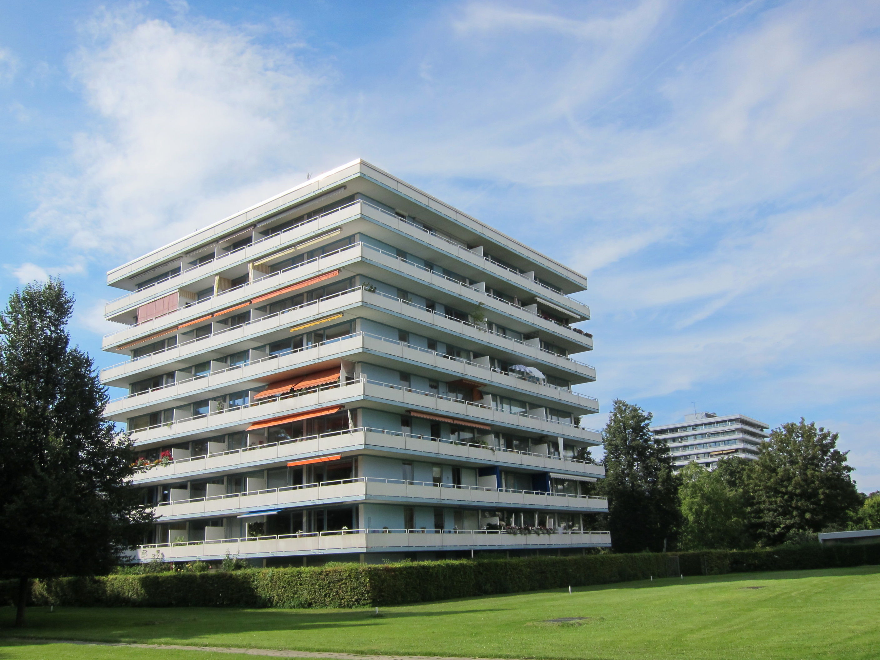 Wohngebäude Klingsorstr. 10 im Cosimapark, München-Bogenhausen, erbaut 1963 - 1969